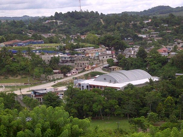 Foto tomada desde el Palo Encebado de San Luis.